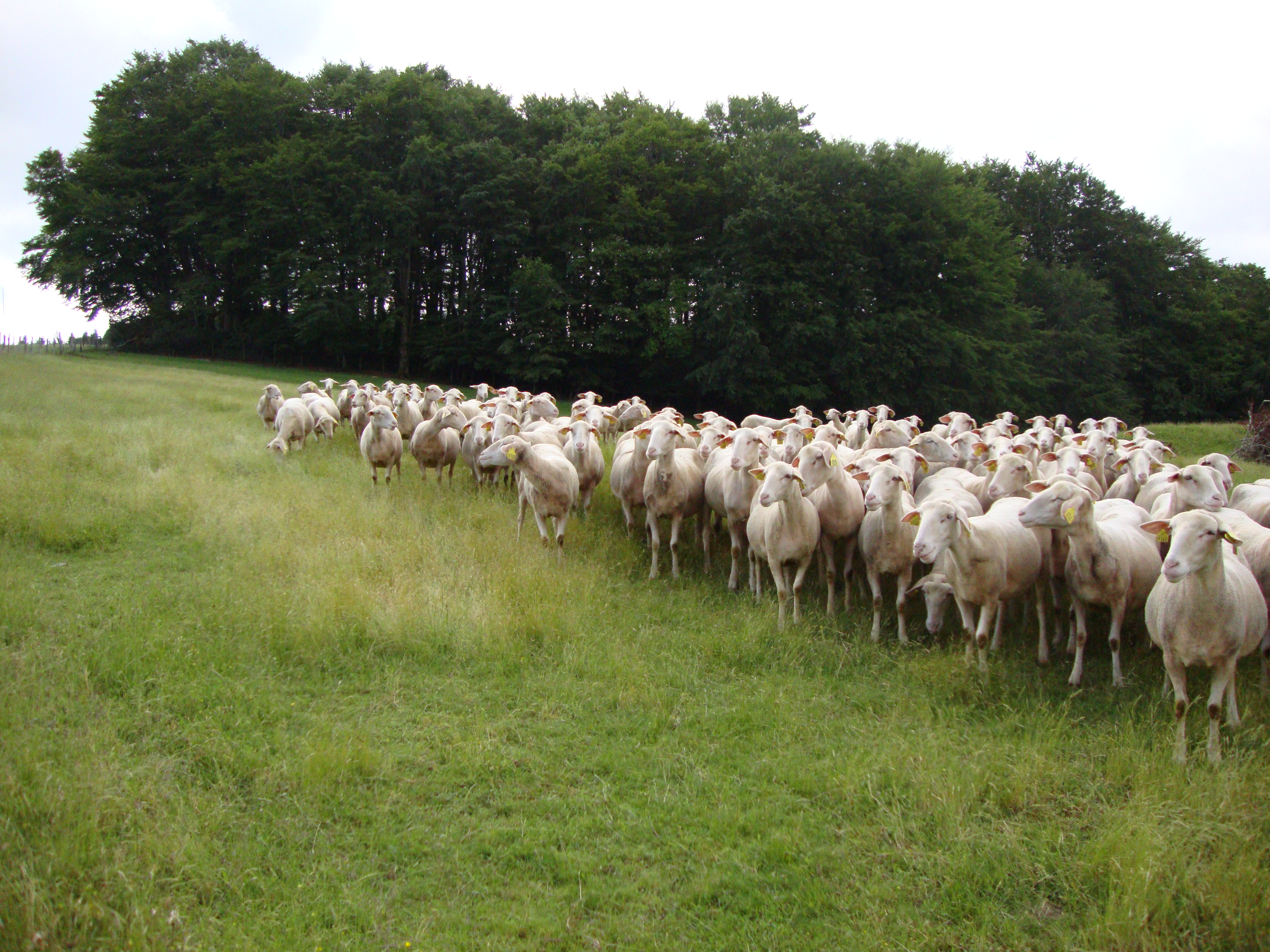 Anglès (Tarn, Fr) pré aux moutons au lieu-dit Crouzettes.